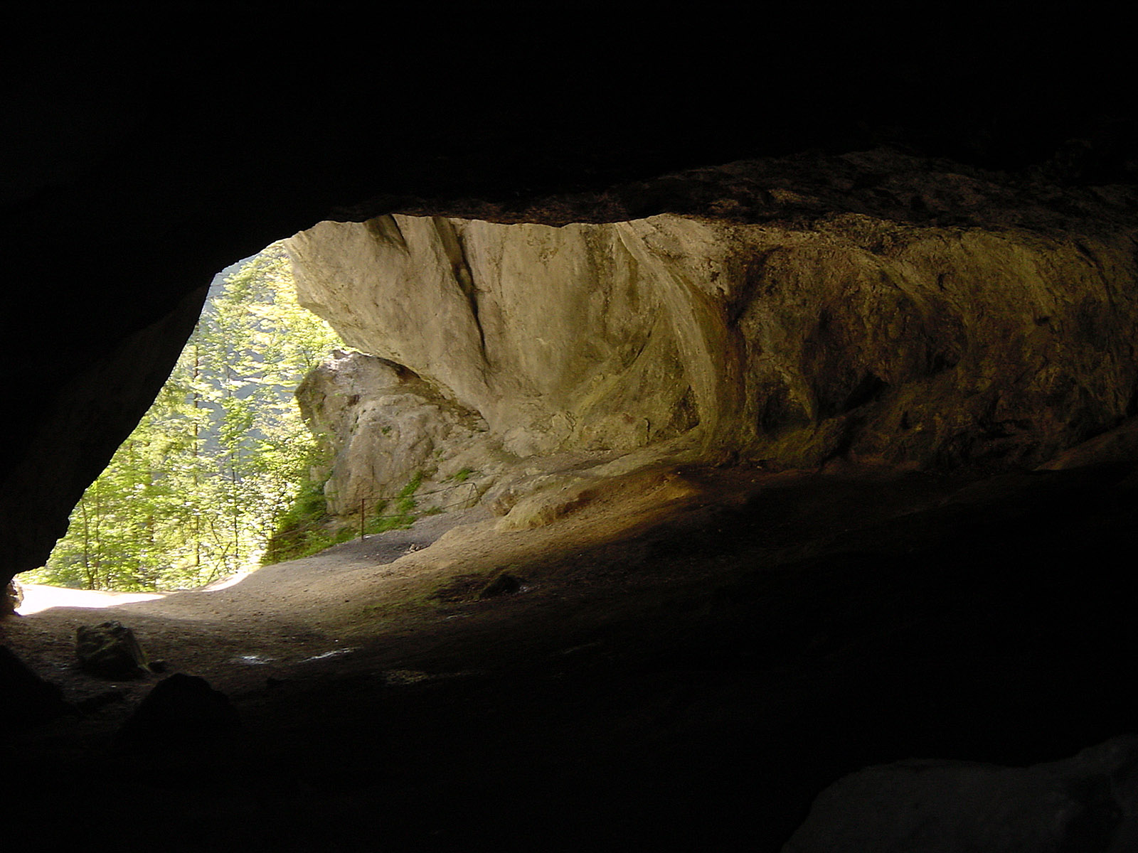 Beschreibung: Tischofer Höhle im Kaisertal Quelle: selbst fotografiert (10. September 2004) Fotograf oder Zeichner: Bonanza Lizenzstatus: GNU FDL